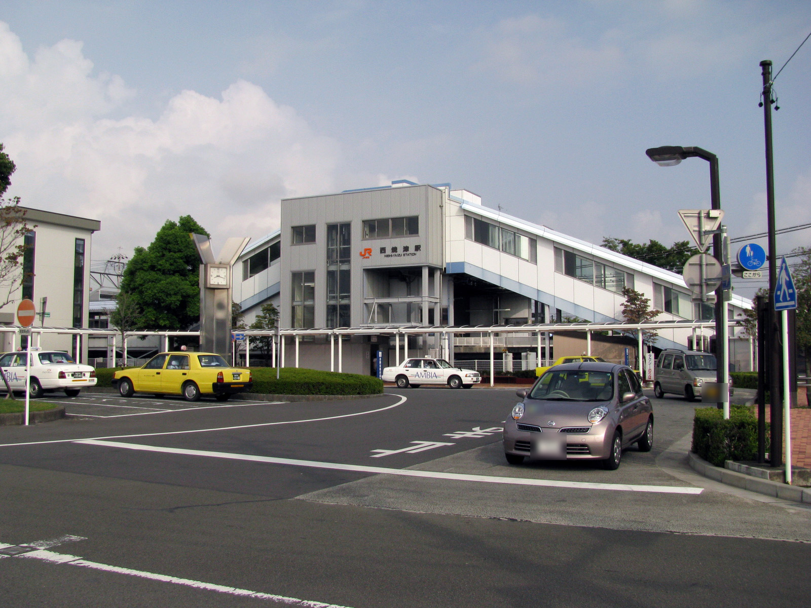 JR東海東海道本線西焼津駅